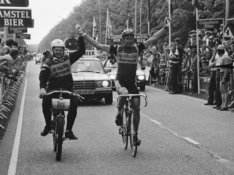 Ludo Peeters lors de sa victoire à "Zuiderzee Derny Tour " en 1982